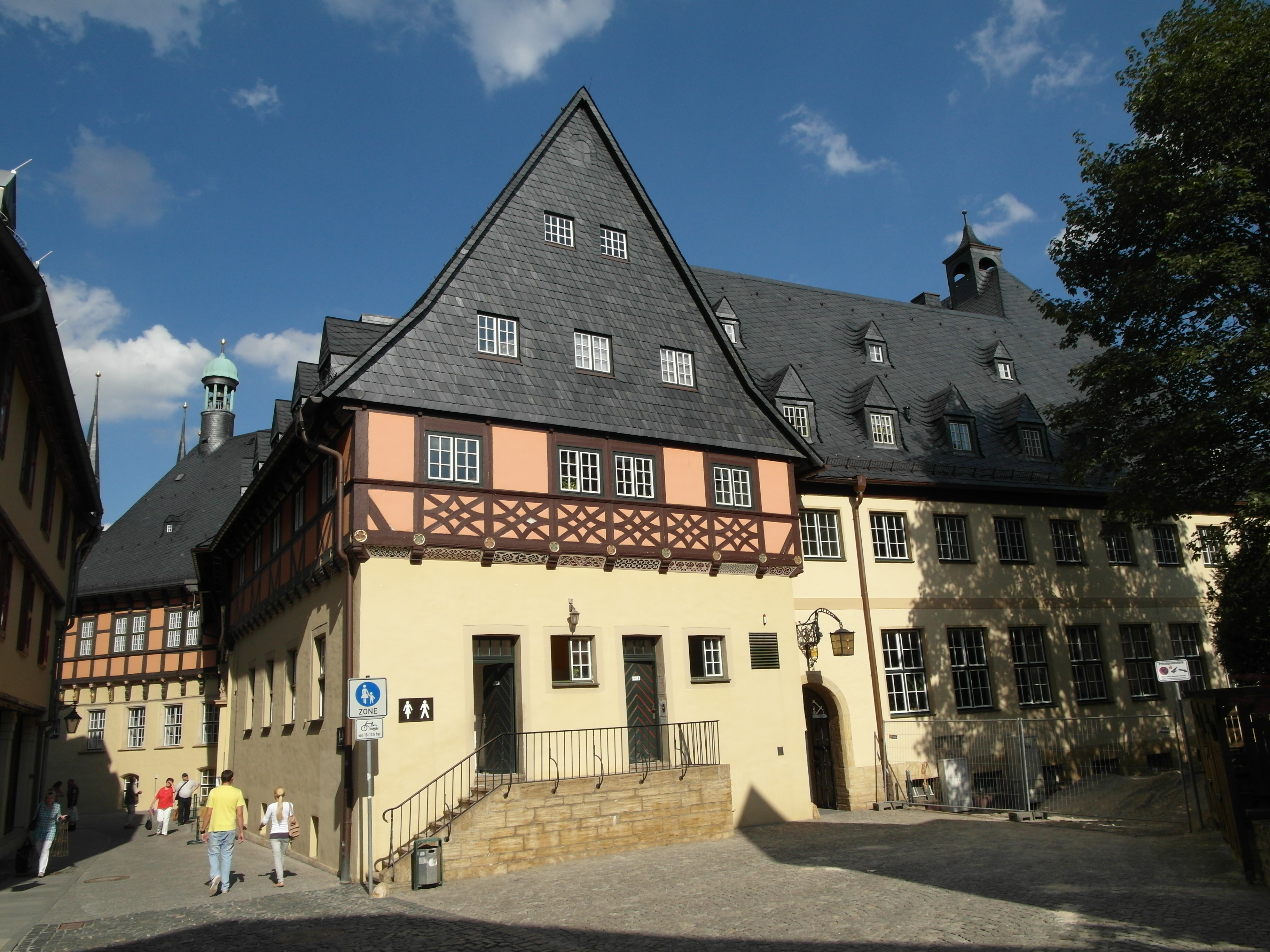 Südseite des Rathauses von Wernigerode